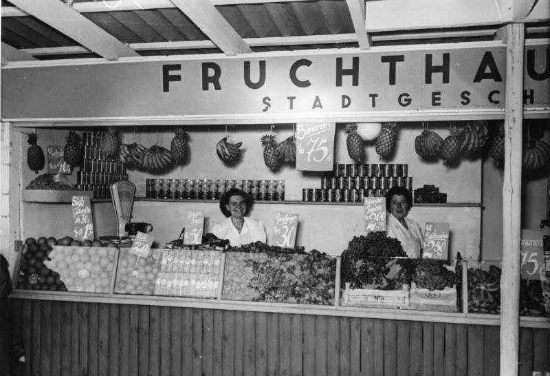 Erste Bundesgartenschau in Hannover Deutschlands beneidete Läden mit ihren exotischen Genüssen.